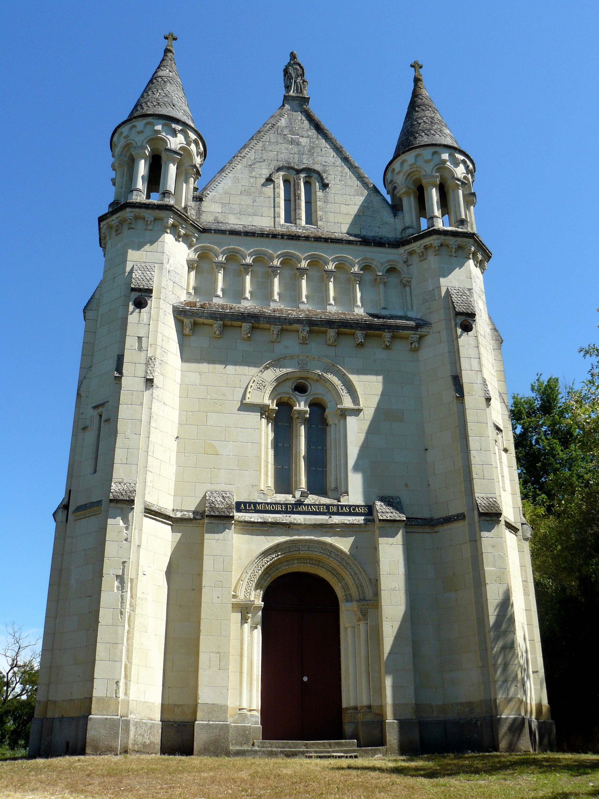 Chapelle Sainte-Barbe-des-Mines (Chalonnes-sur-Loire, Maine-et-Loire, France). Edifiée en 1858-1860 par sa veuve en mémoire d'Emmanuel Pons Dieudonné de Las Cases (1800-1854), fils d'Emmanuel de Las Cases (le père et le fils accompagnèrent Napoléon Bonaparte à Sainte-Hélène).